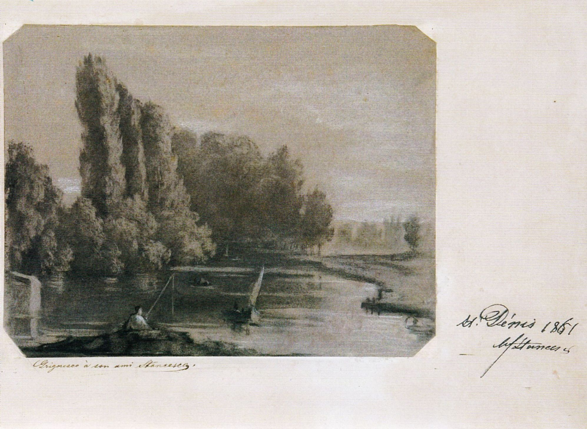 Peisaj din Saint-Denis